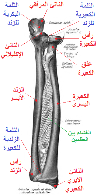 الزند والكعبرة للساعد الأيسر ، نظرة أمامية. Ulna and Radius of Left arm, anterior view.